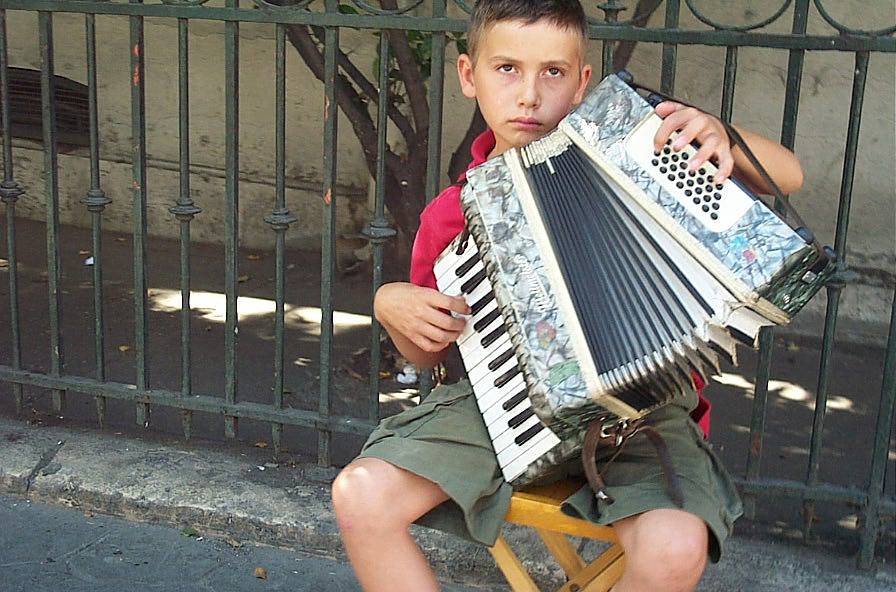 Beyoglu, Istanbul